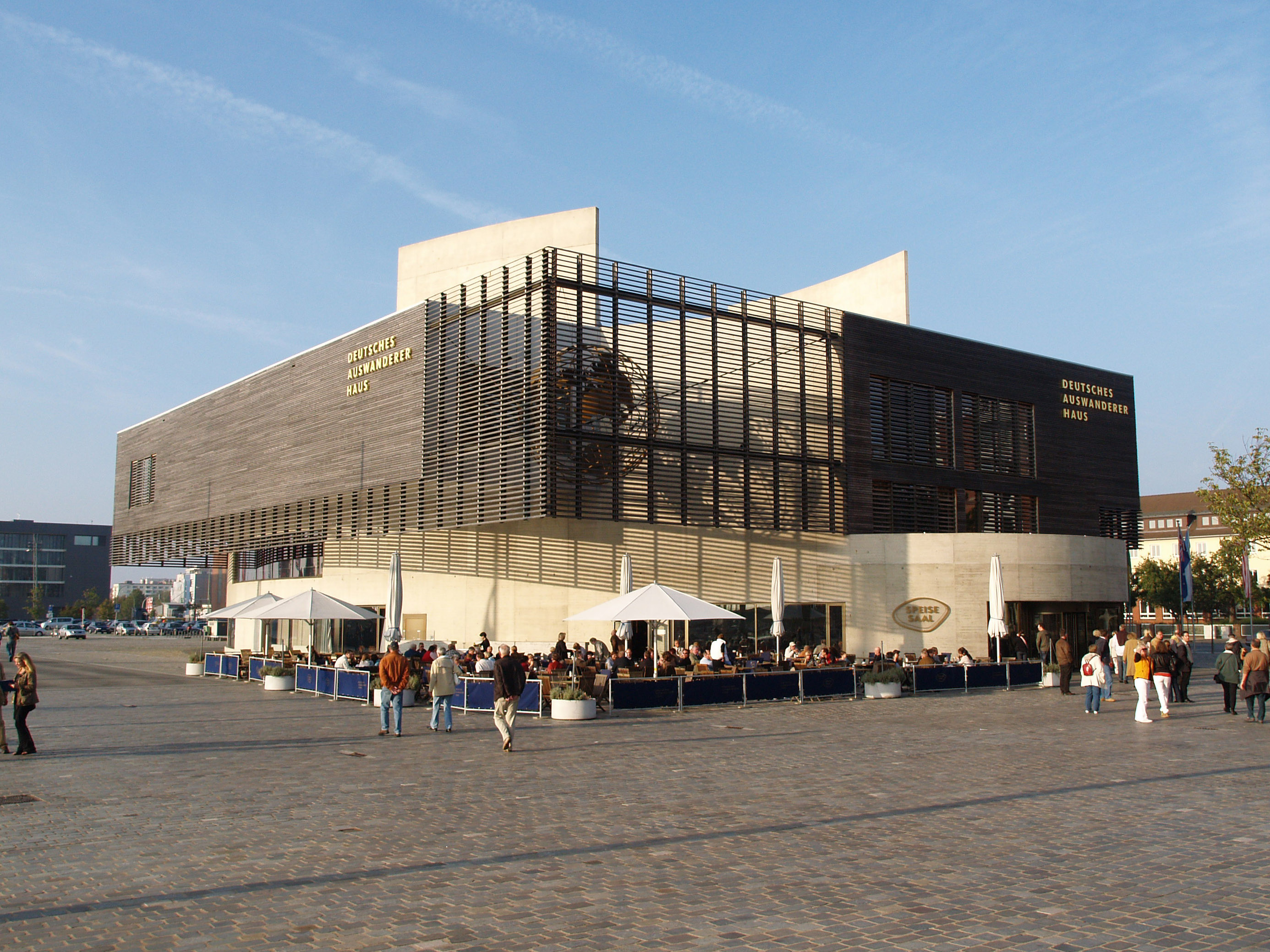 German Emigration Center Native nameDeutsches AuswandererhausLocationColumbusstraße 65 27568 Bremerhaven GermanyCoordinates53° 32′ 43″ N, 8° 34′ 27″ E Established8 August 2005WebsiteDeutsches AuswandererhausAuthority control : Q318809 VIAF: 131244556 LCCN: nr2005008075 GND: 16035841-3 SUDOC: 118763741 WorldCat